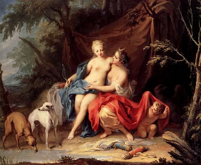 62 × 76 cm